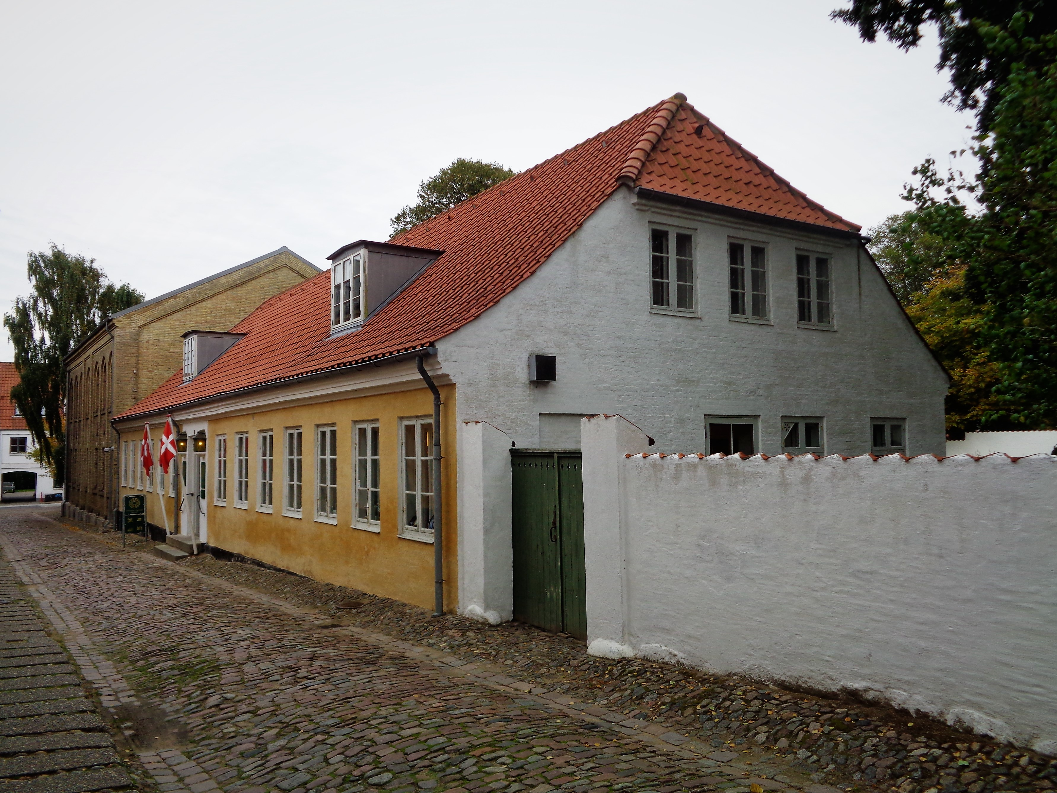 Das Vendsyssel historiske museum in Hjørring.